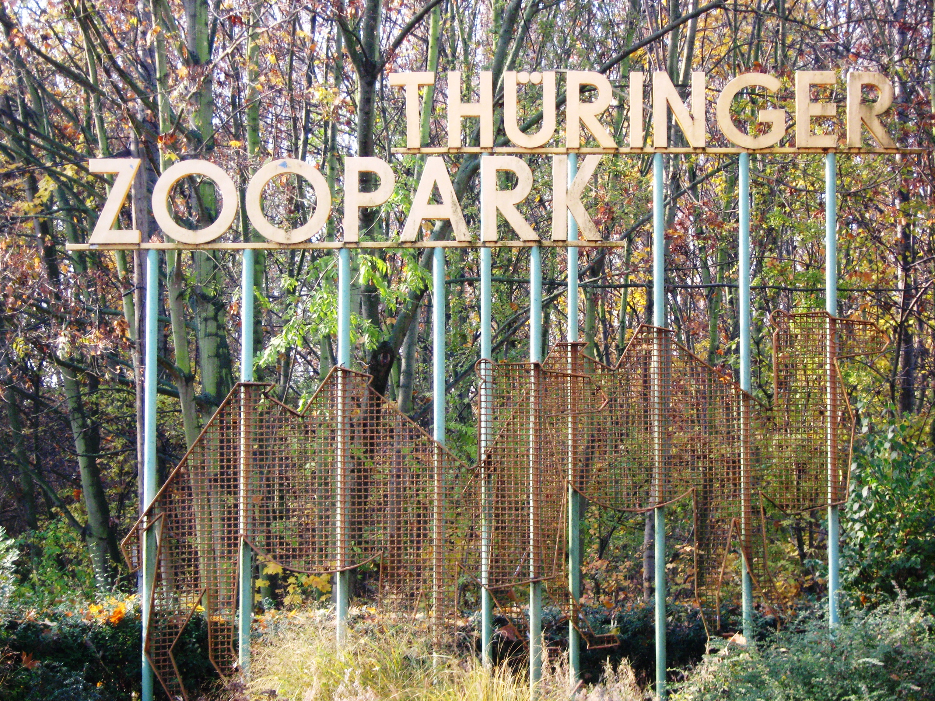 Alter Eingang am Zoopark Erfurt